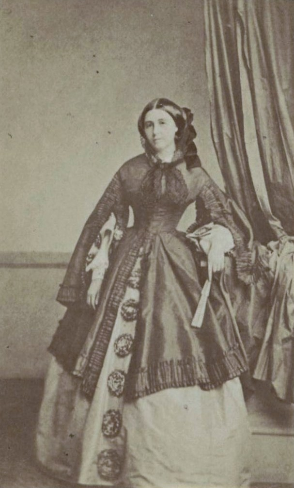 Леонилла Ивановна Витгенштейн, ур. Барятинская (1816—1918)